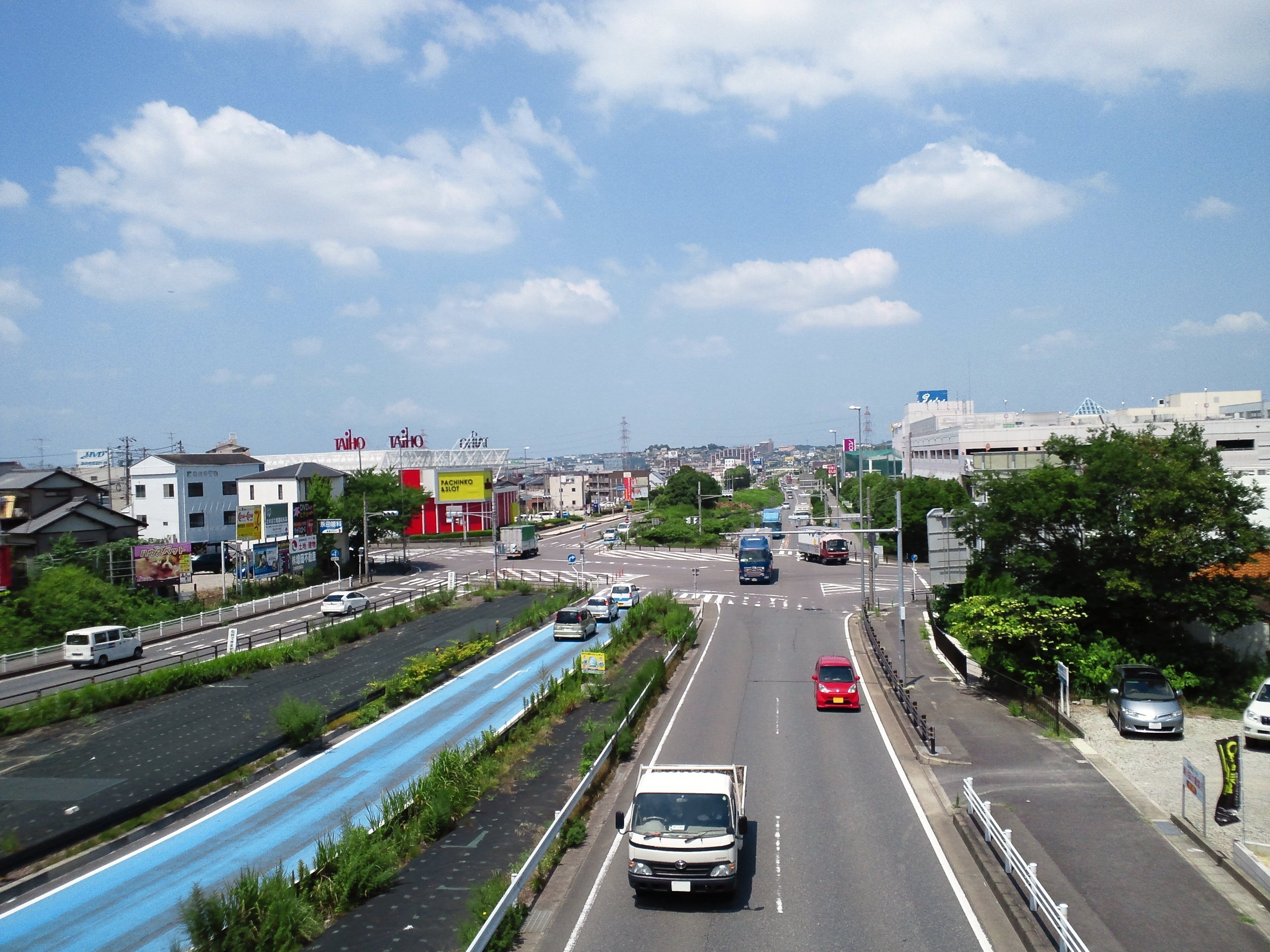 国道153号豊田西バイパスの三好前田交差点。みよし市油田の歩道橋より名古屋方面を望む。